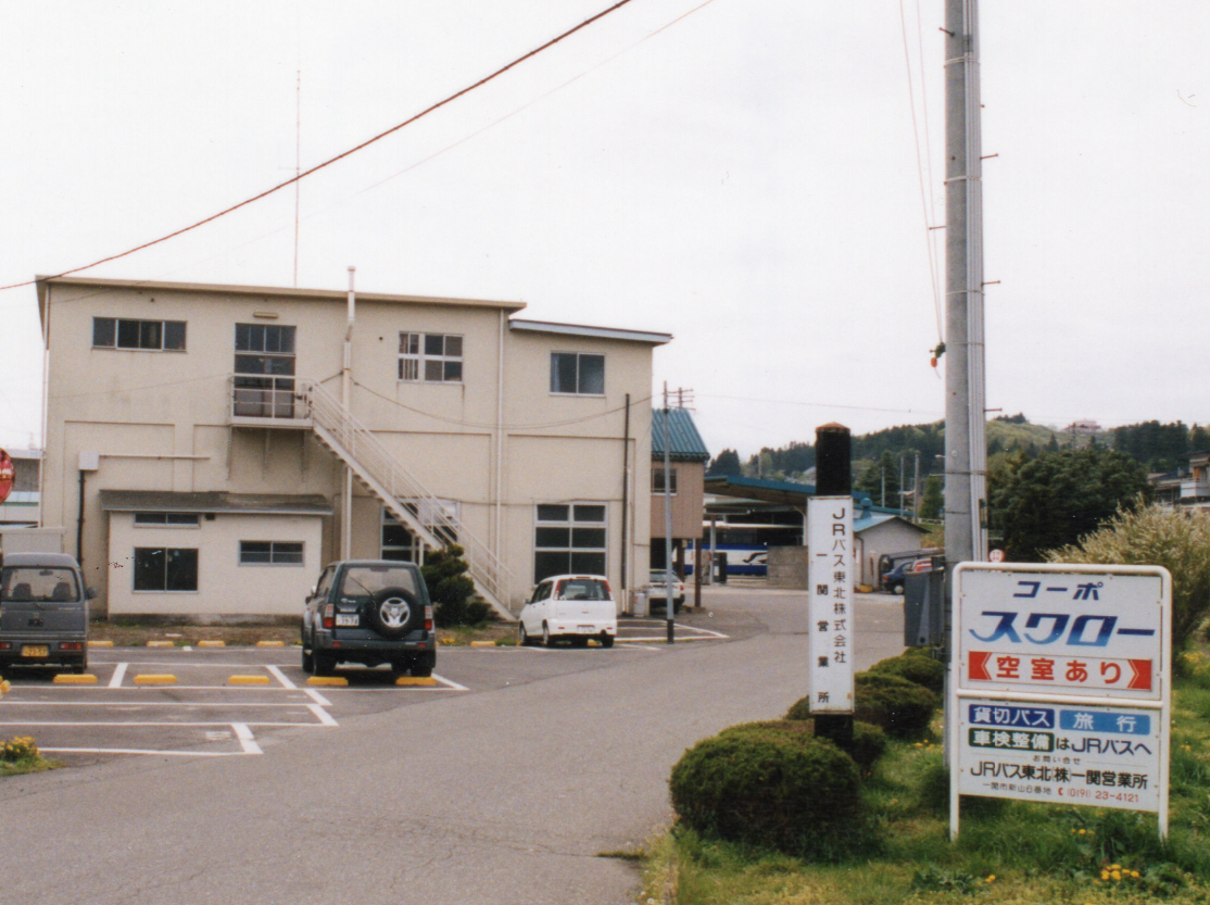 一関営業所（営業所名に「ノ」は入らない）